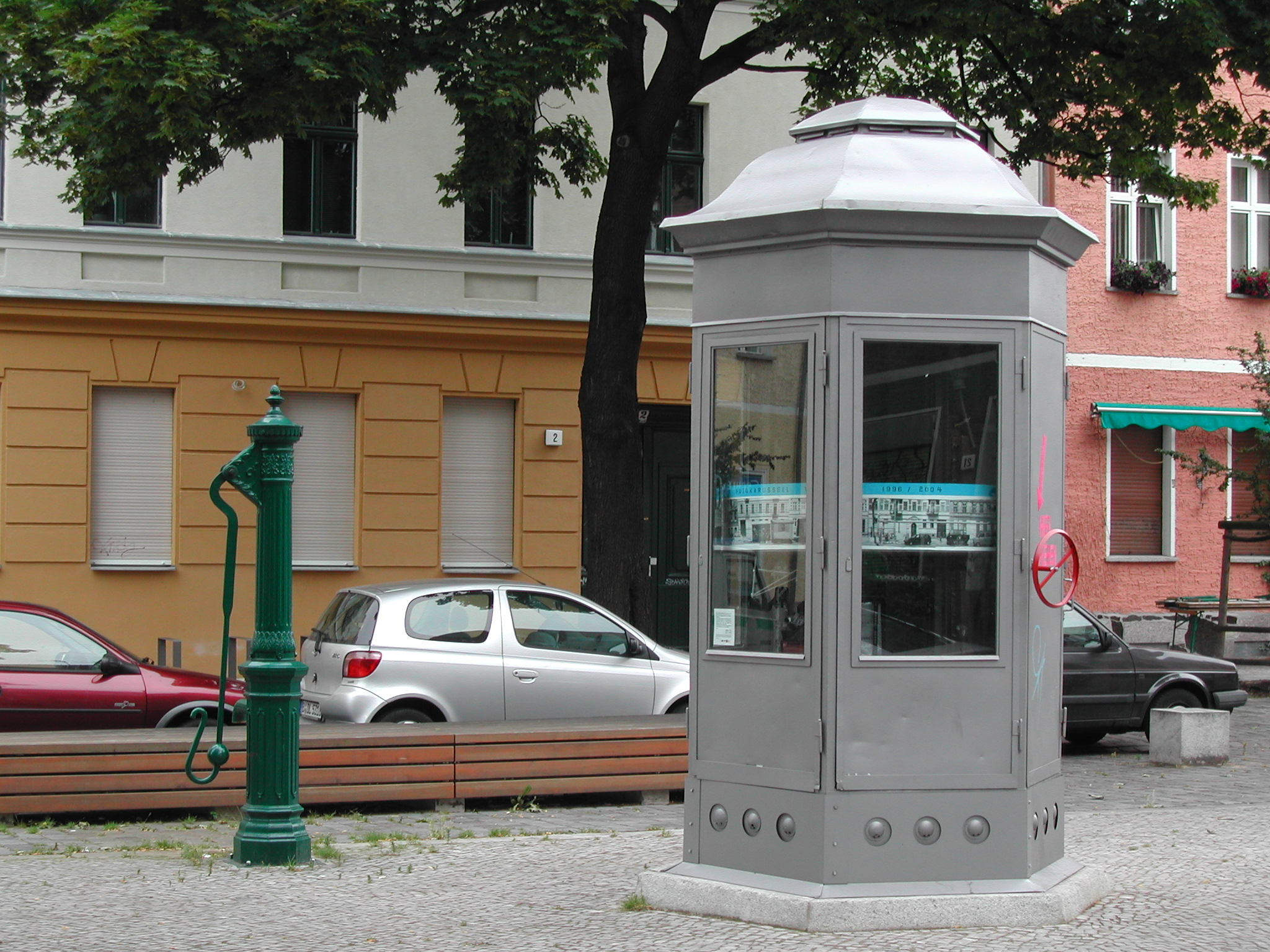 Ausstellung